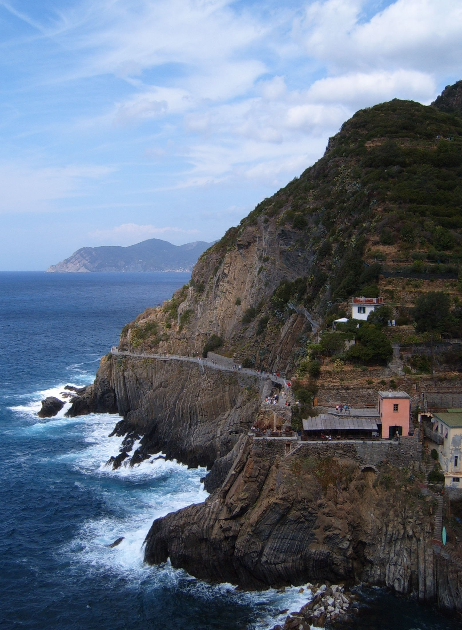 Via dell'Amore, Cinque Terre (Italy)